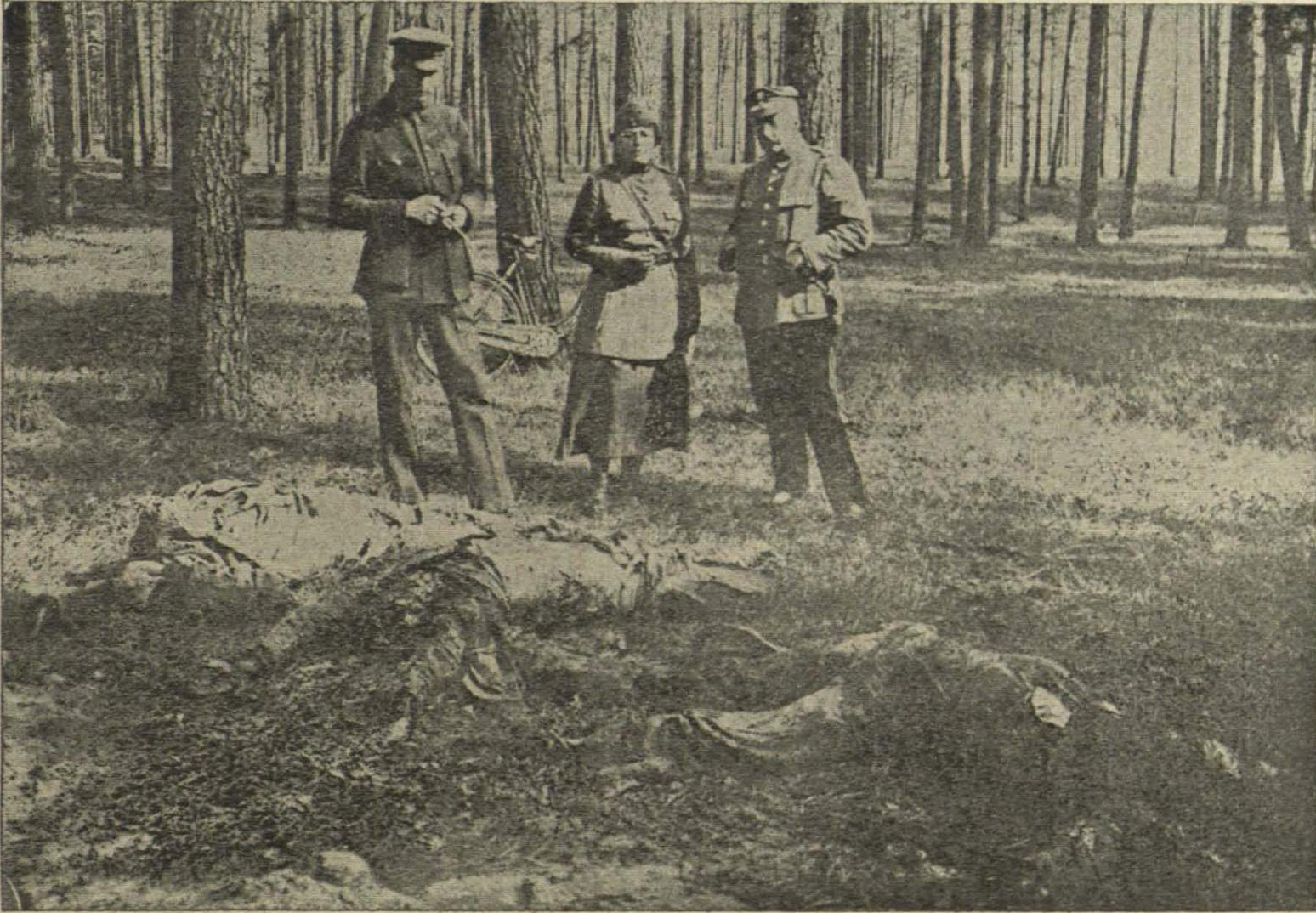 Беларуская (тарашкевіца): Менск (Miensk), Камароўка (Kamaroŭka): Ваньковічаў Лес (Vańkovičaŭ Les). Масавае пахаваньне мірных жыхароў Менску, забітых бальшавікамі